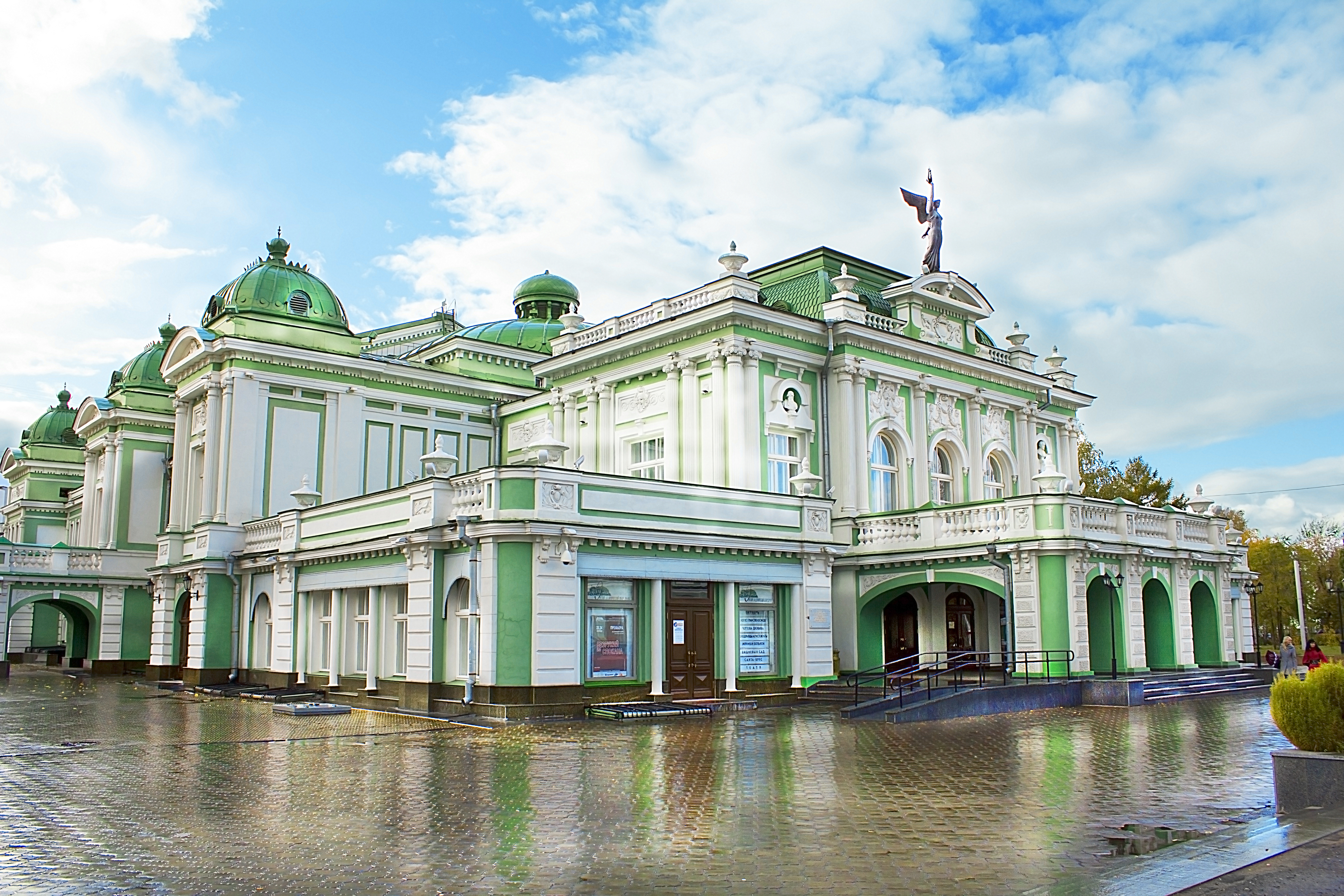 Драматический театр построен в начале ХХ века в 1904 году, находится в историческом центре Омска